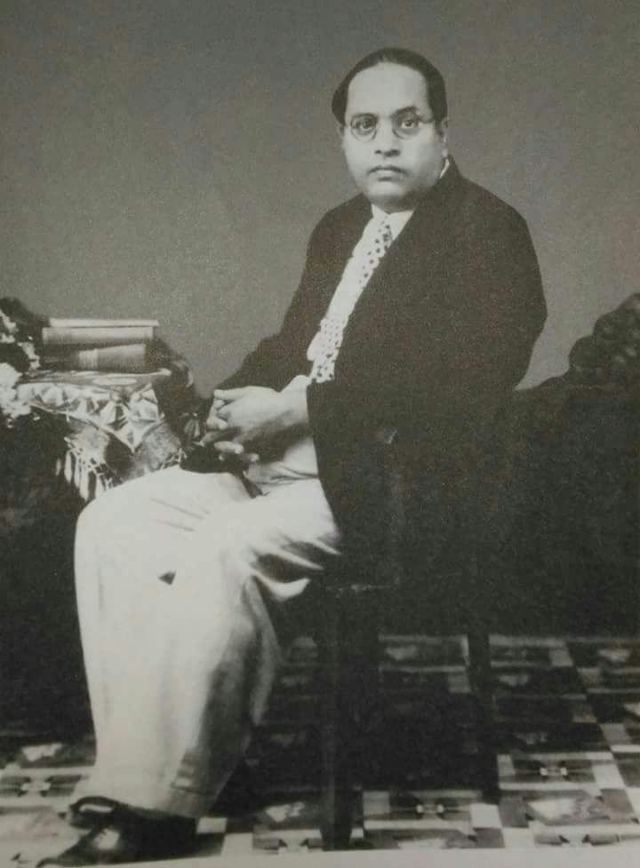 वकिल के रूप में डॉ॰ बाबासाहेब आंबेडकर